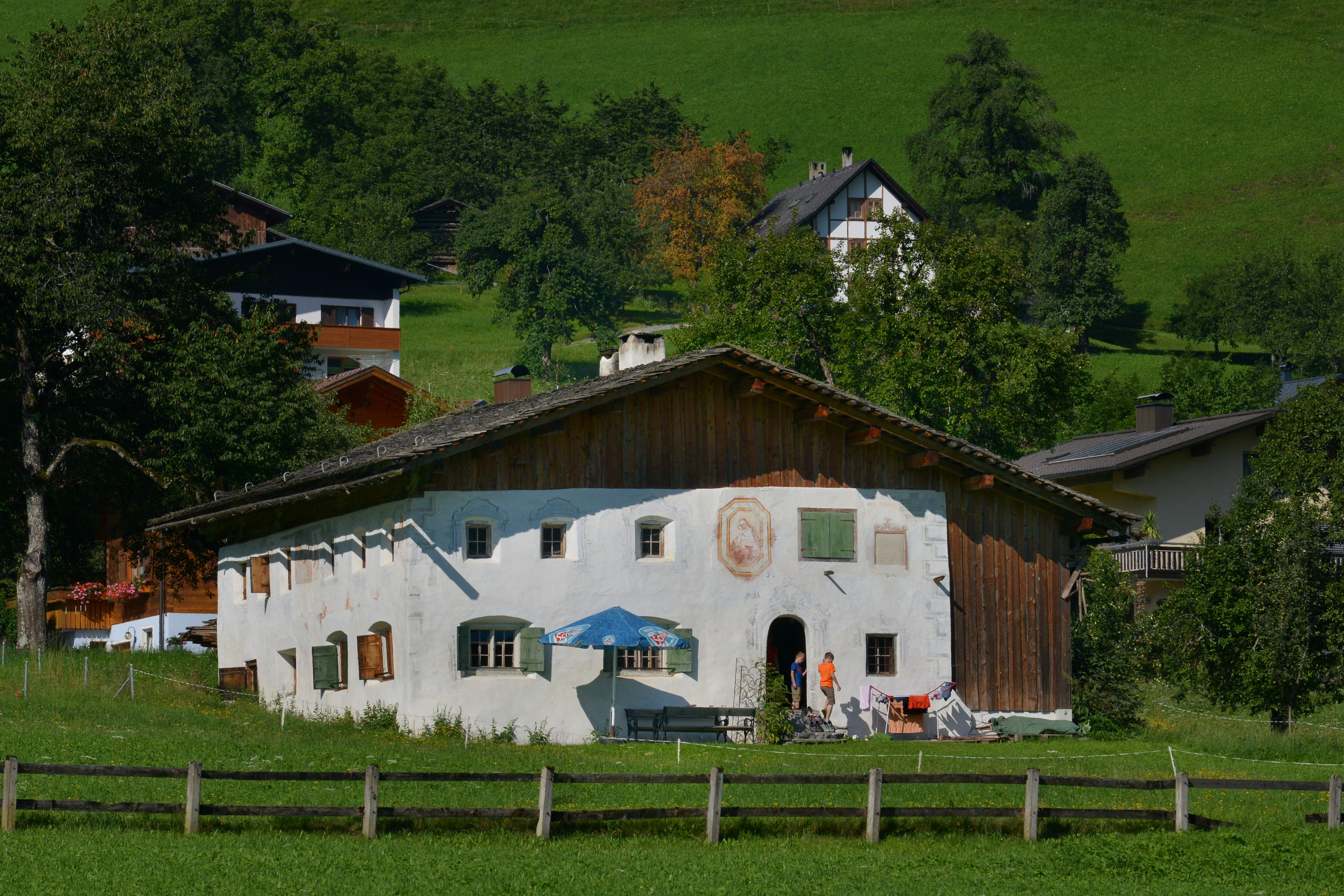 Sandrellhaus Das spätmittelalterliche Bauernhaus in 6774 Tschagguns, Unterer Archaweg 5/6 wurde in der Blütezeit des Montafoner Bergbaues errichtet und stellt eine Montafoner Paarhofanlage (Wohnhaus und Stall) dar, deren Bauweise auf einen rätoromanischen Einfluß hinweist. Dendrochronologische Untersuchungen legten den Baubeginn im Jahre 1457 fest.